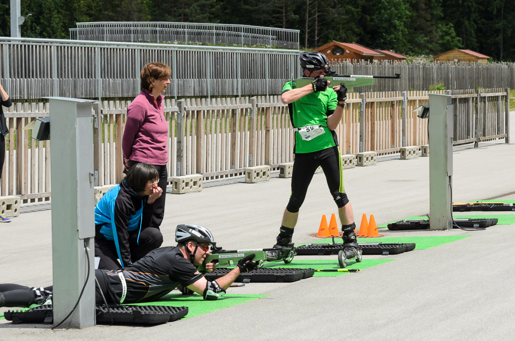 Liegender- und Stehenderanschlag beim Modernen Biathlon mit Lichtgewehren